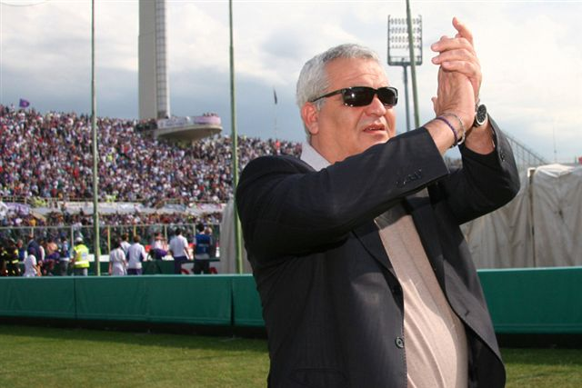 Il direttore sportivo della Fiorentina Pantaleo Corvino durante Fiorentina-Parma